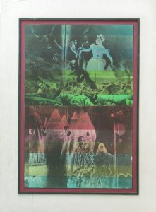 Spielende junge Frauen über Geistergestalten